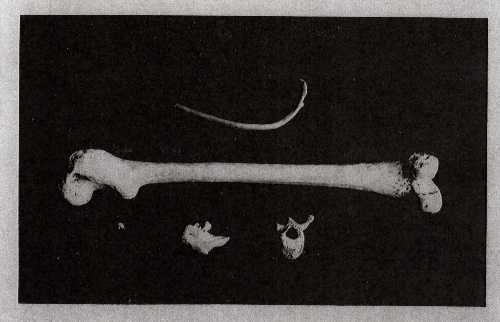 Carte postale des reliques de Saint Germain l'Ecossais le Scot en l'égise Saint-Germain l'Ecossais à Amiens (3)